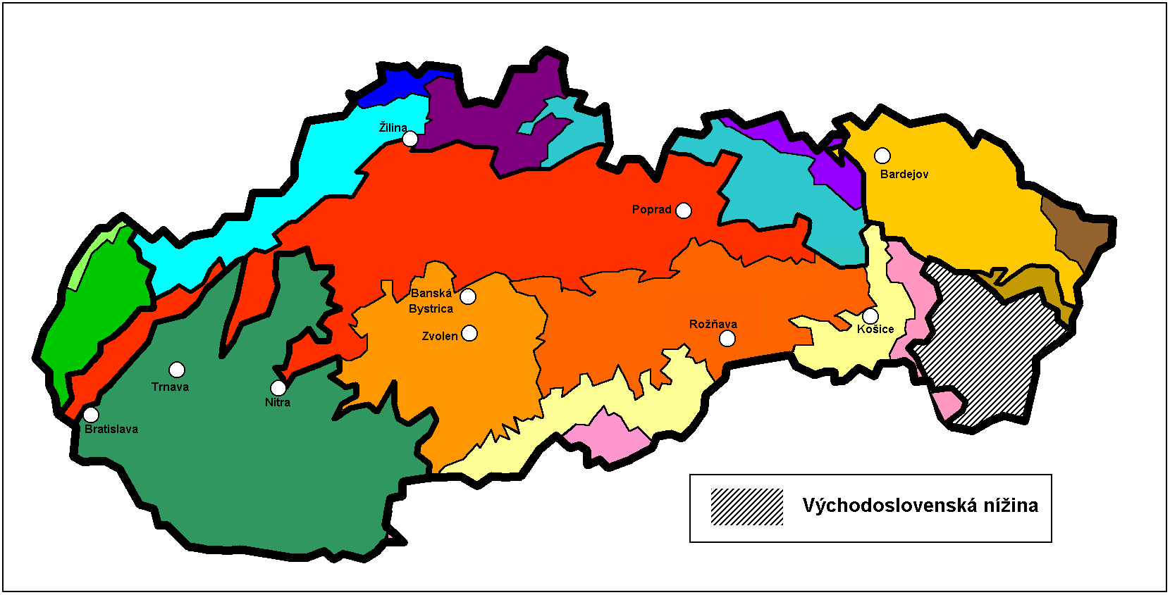 Východoslovenská_nízina